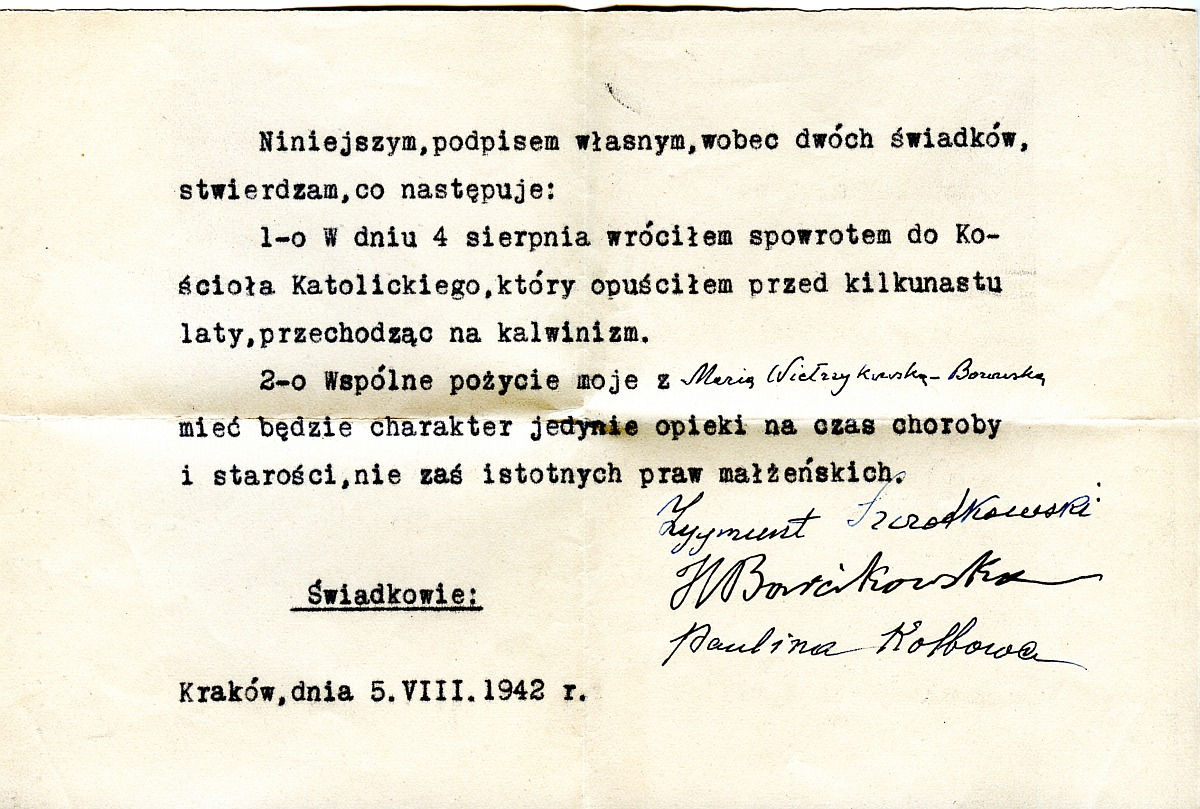 Oświadczenie Zygmunta Szczotkowskiego w sprawie konwersji (powrotu) do Kościoła Katolickiego.